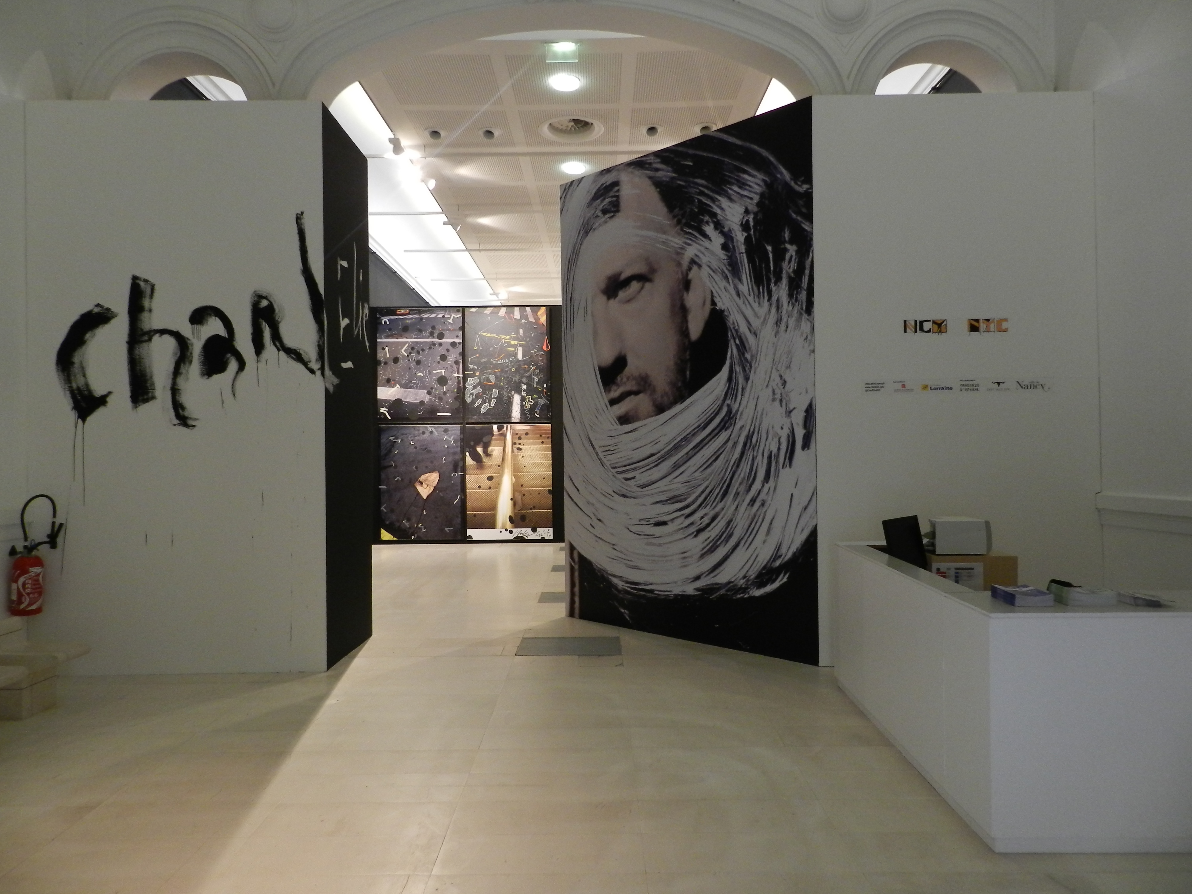 Photo de l'exposition